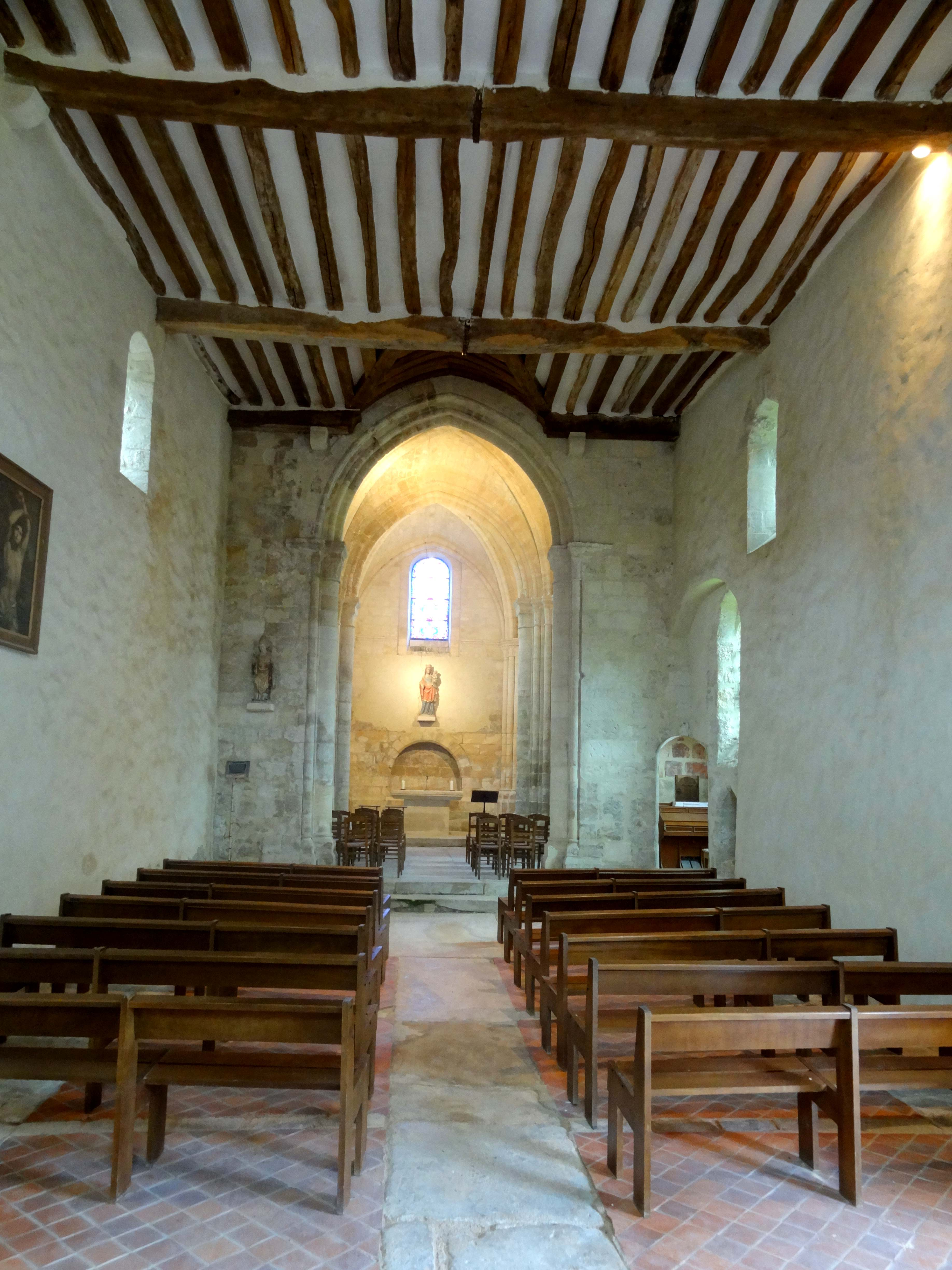 Intérieur de l'église - voir titre.